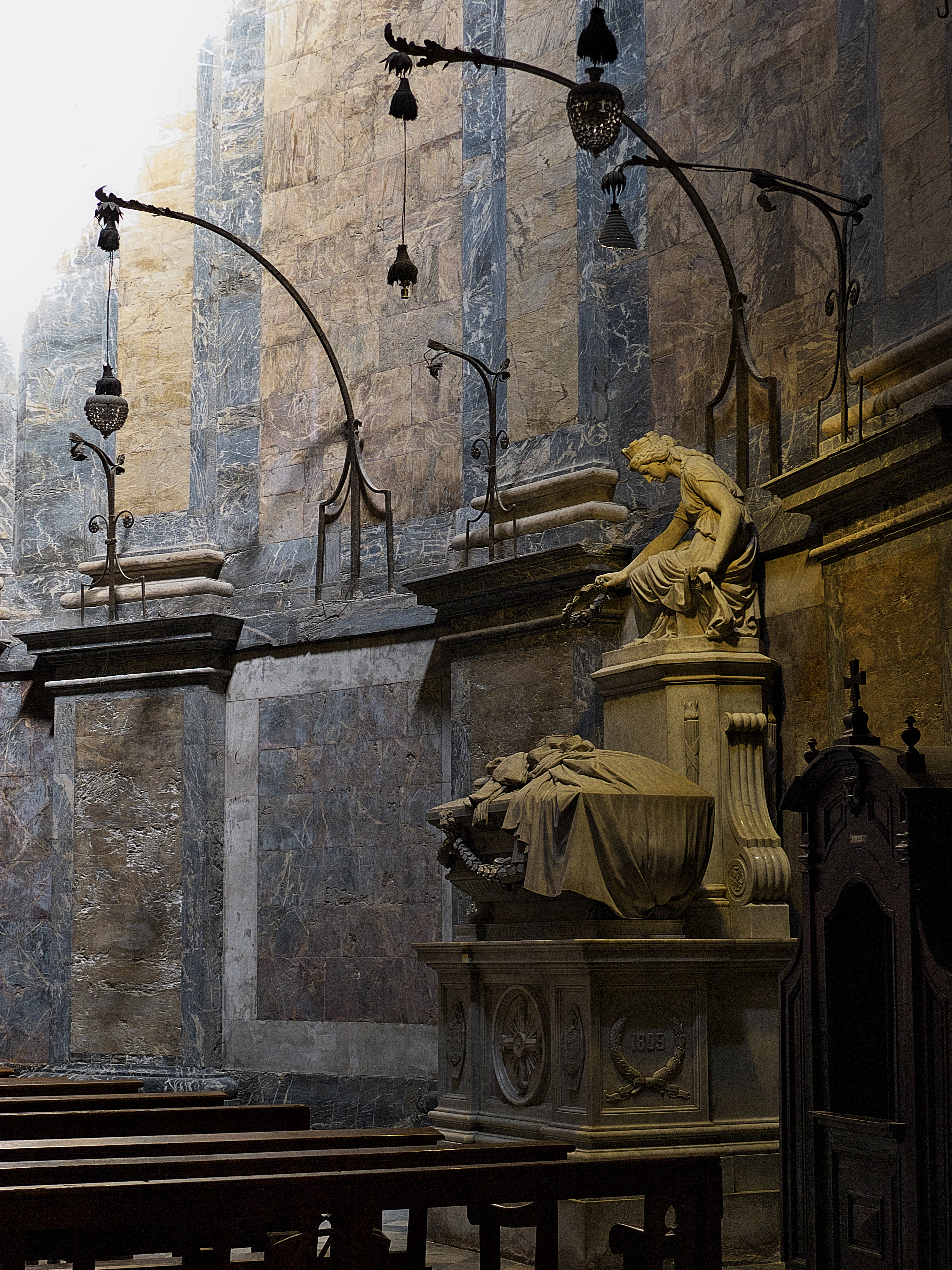 Iglesia de San Félix (Gerona), Capilla de San Narciso. Sepultura de Mariano Álvarez de Castro, gobernador de Gerona, y defensor de la ciudad durante la Guerra de la Independencia Española. Jerónimo Suñol esculpió la sepultura en mármol (1892)